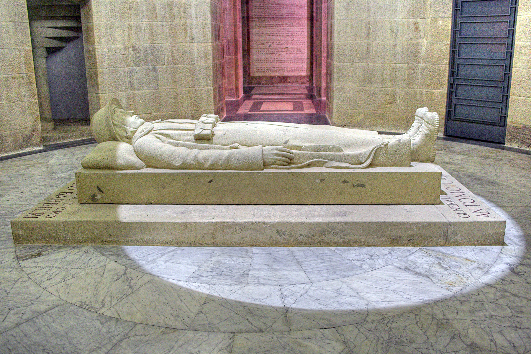 Military sacrarium in Pocol, Cortina d'Ampezzo, Italy. General Antonio Cantore's and Captain Francesco Barbieri's tomb.